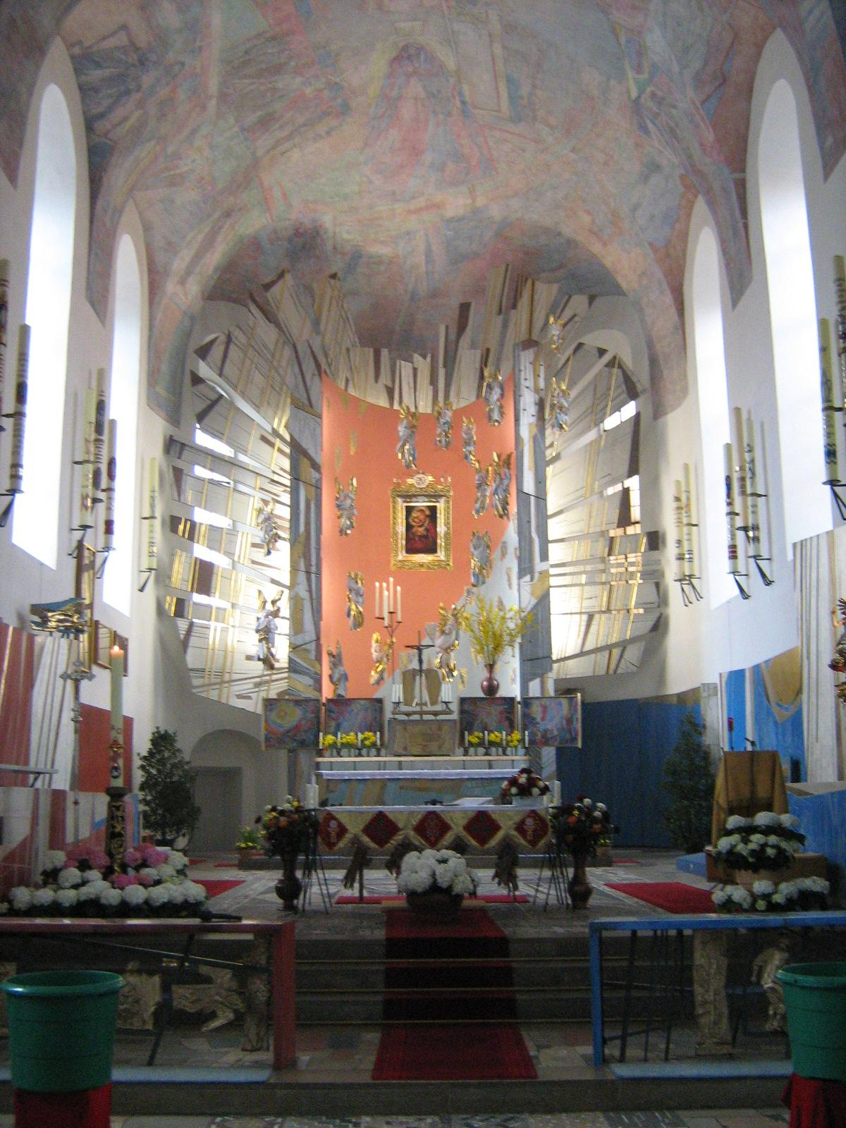 Zu Unserer Lieben Frau vom Kreuzberg in Schwandorf: Blick zum Altar